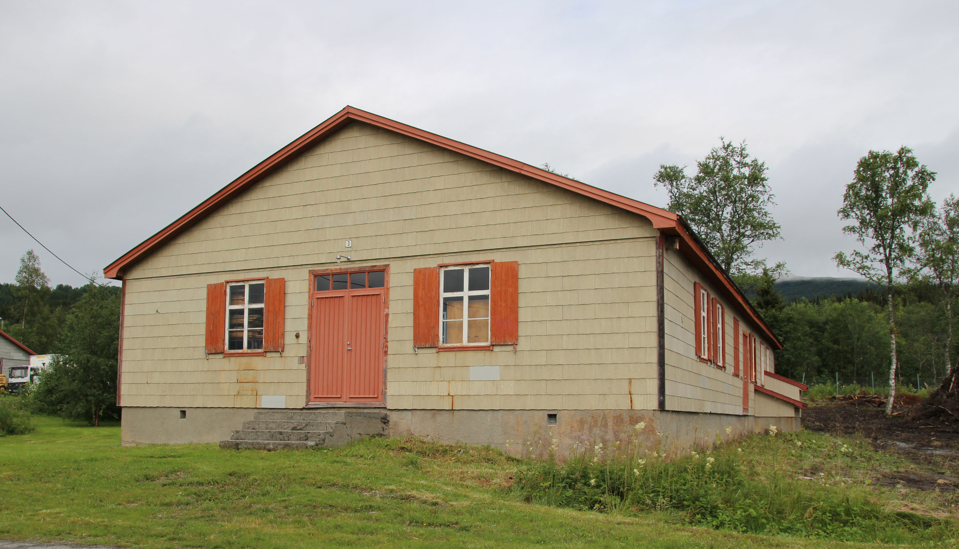 Isolatbrakka ved Klungset leir i Fauske, Nordland.